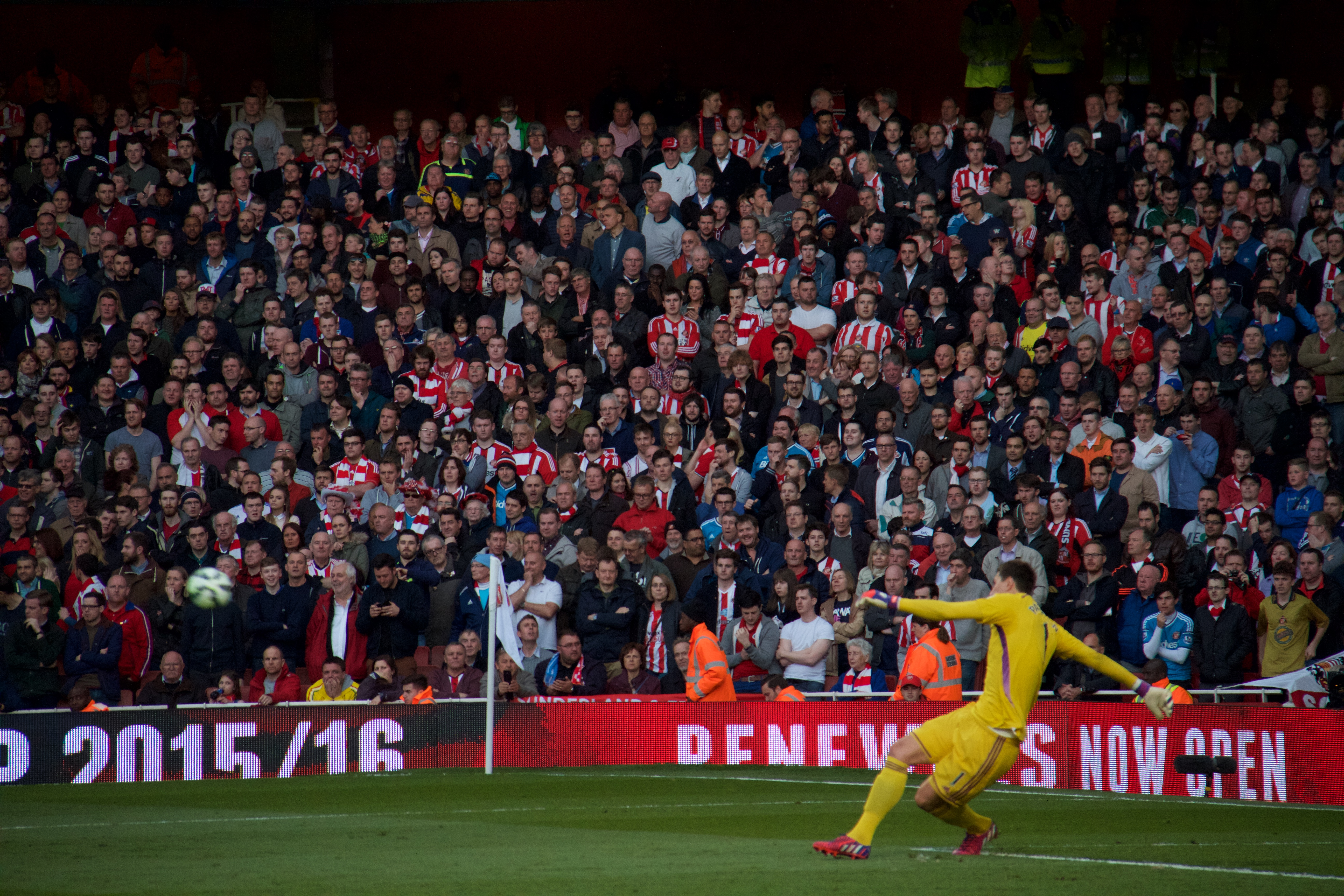 Pantilimon goal kick